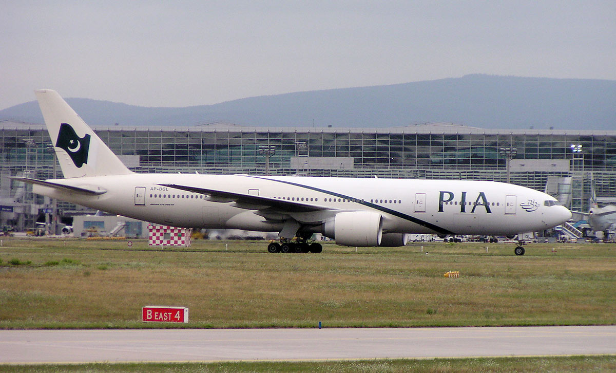 Pakistan International Airlines Boeing 777-200ER (AP-BGL) in Frankfurt (EDDF)